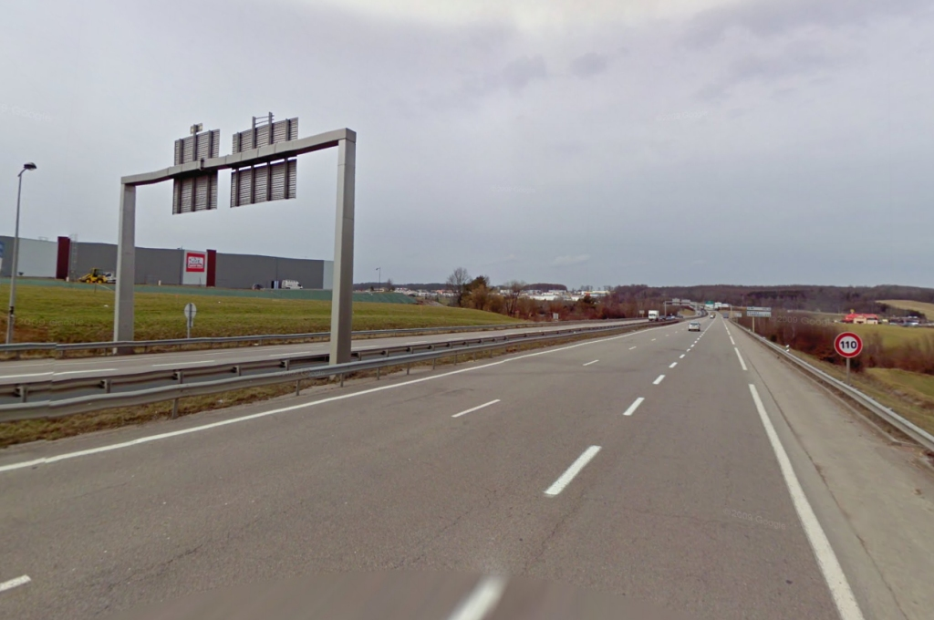 La RN57 dans l'Agglomération Spinalienne.